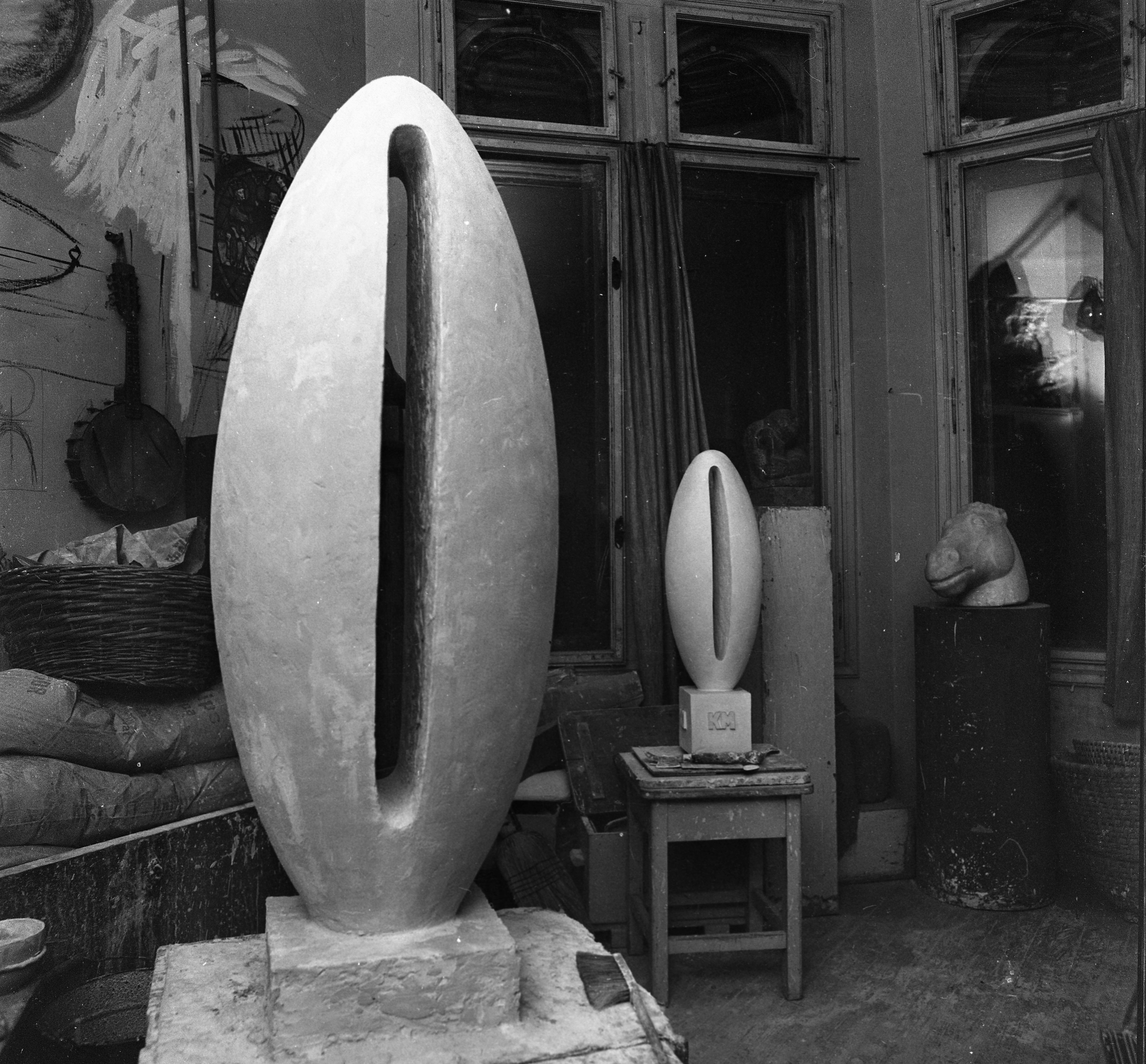 készül az új "0" kilométerkő Borsos Miklós szobrászművész műtermében. Location: Hungary Tags: sculpture, studio Title: készül az új \